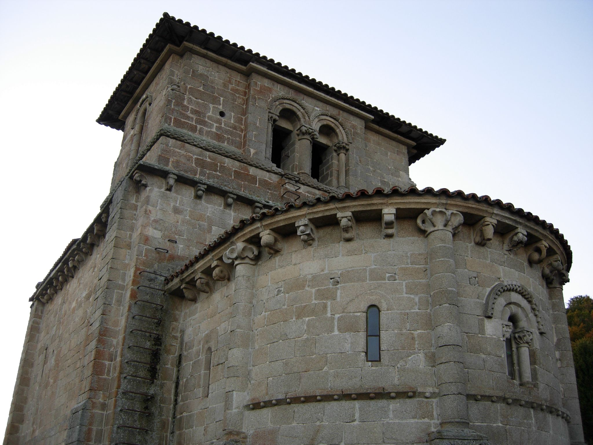 Absida da igrexa de San Miguel de Eiré, Eiré, Pantón